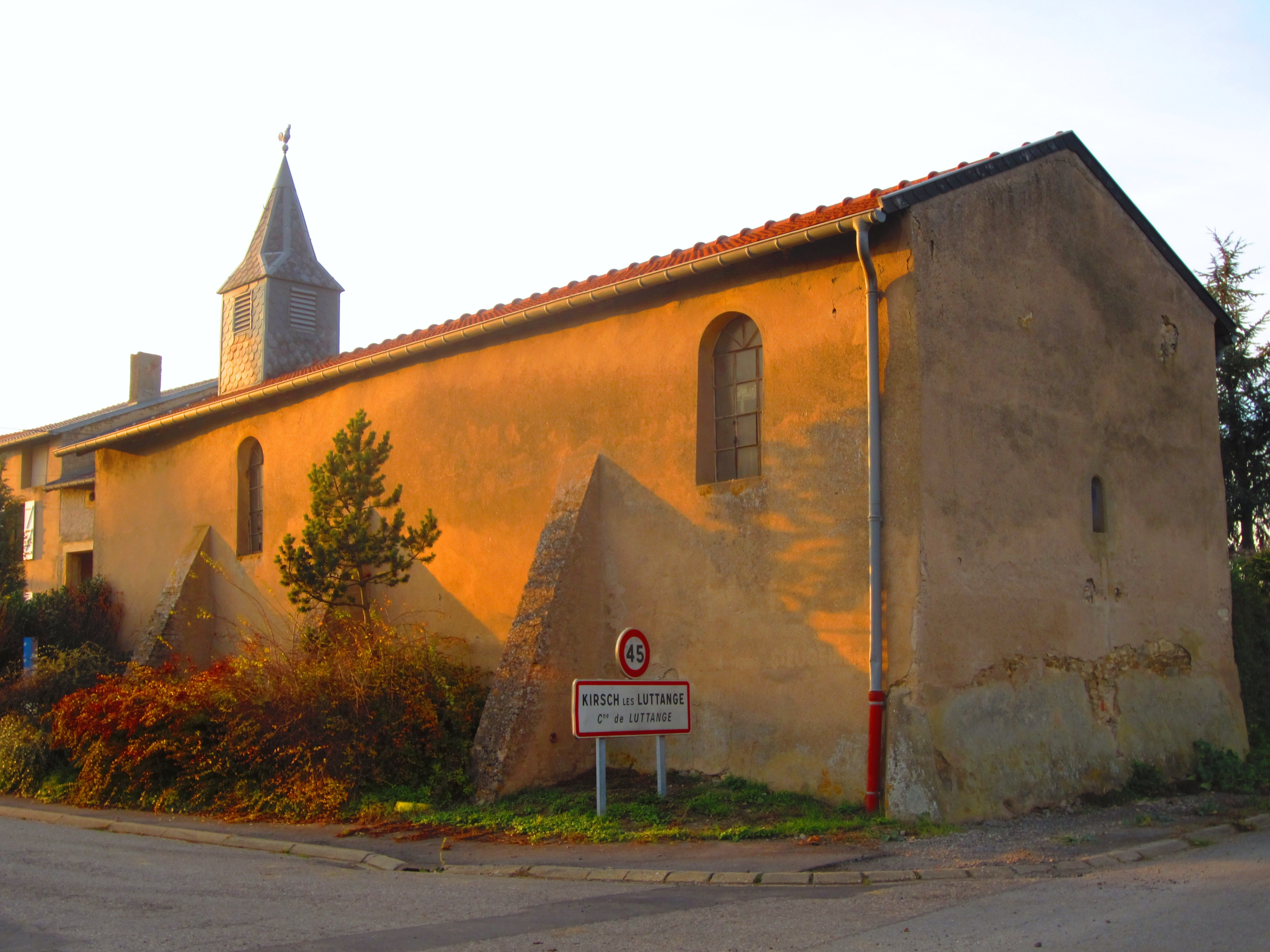 Description chapelle Saint-Georges à Kirsch-lès-Luttange Date23 November 2011Sourcemon appareil photoAuthorAimelaimePermission(Reusing this file) chapelle Saint-Georges à Kirsch-lès-Luttange